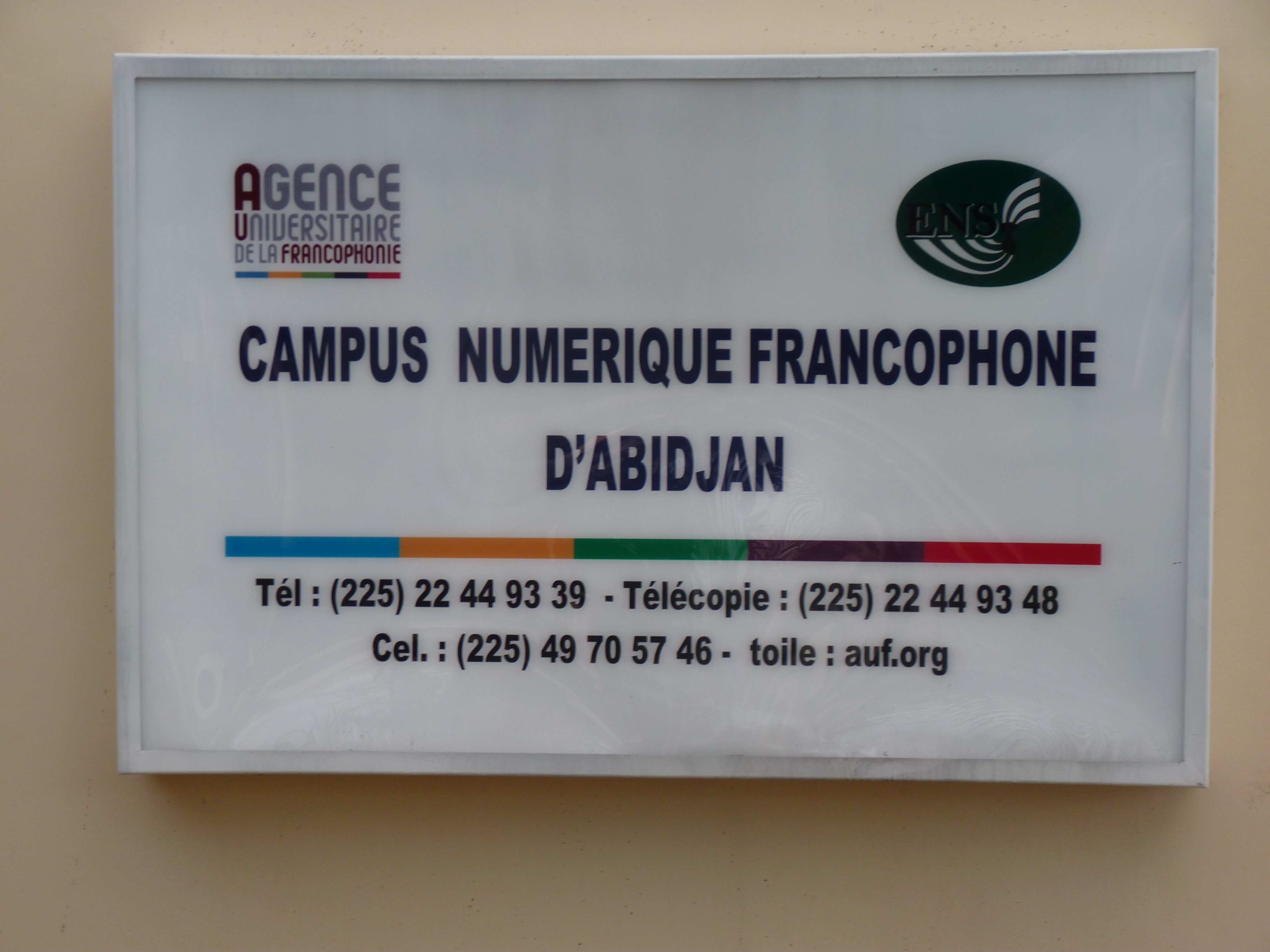 ABIDJAN COCODY